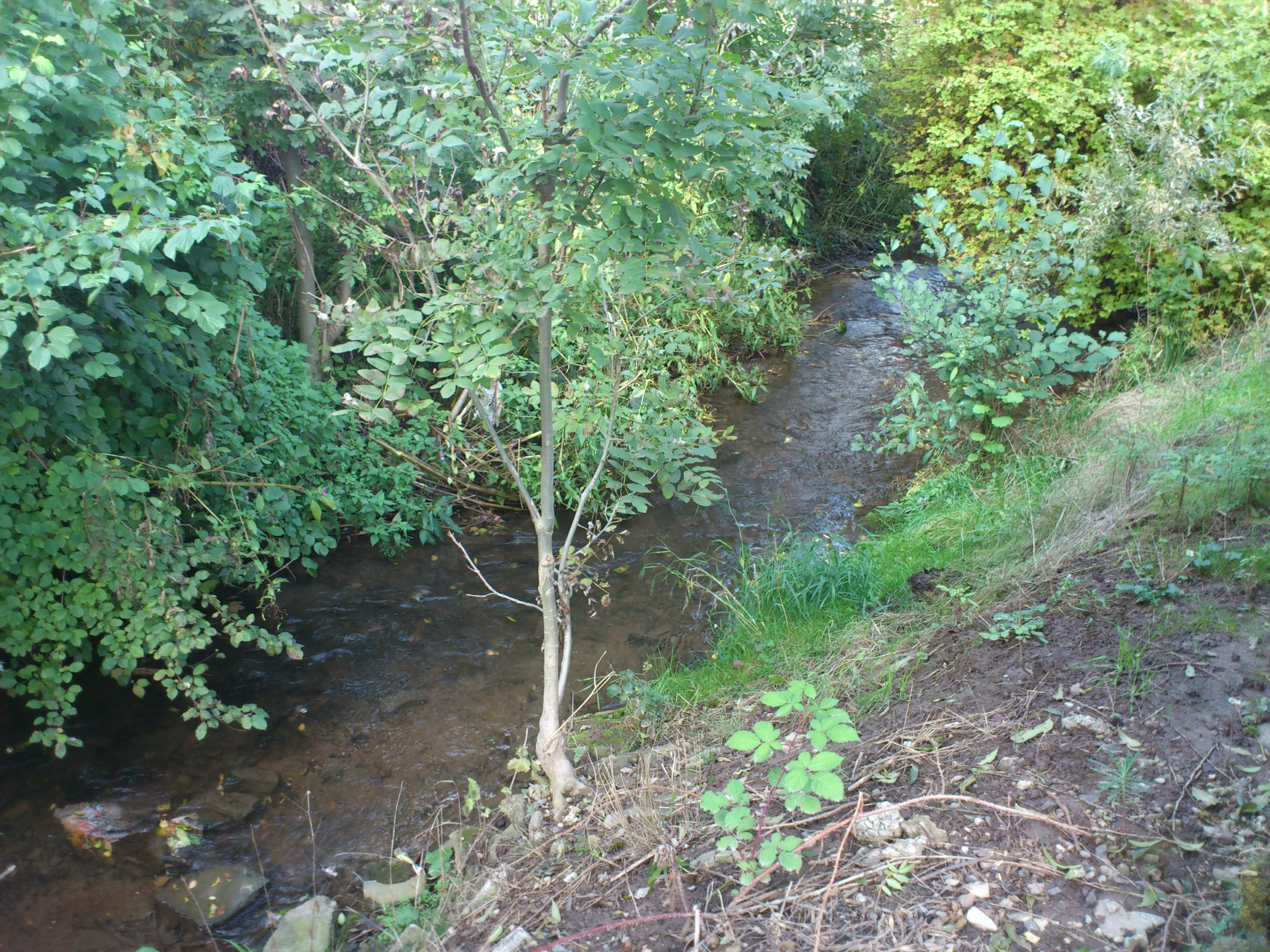 Der Fischbach in Groß-Bieberau